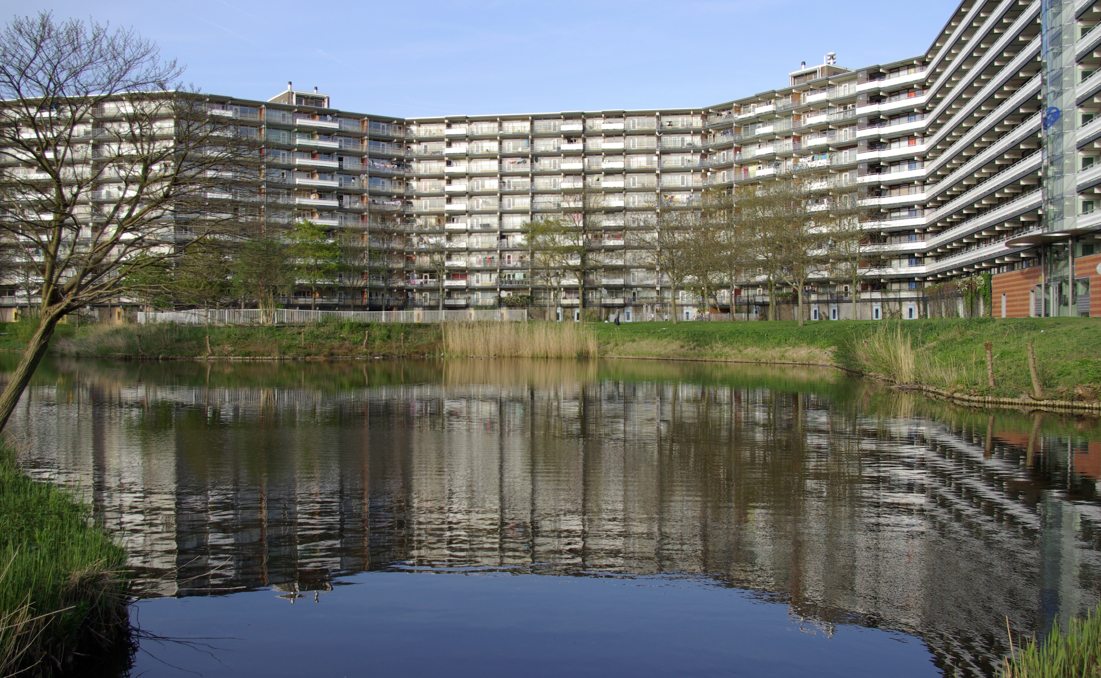 Amsterdam Zuidoost, Flat Hakfort